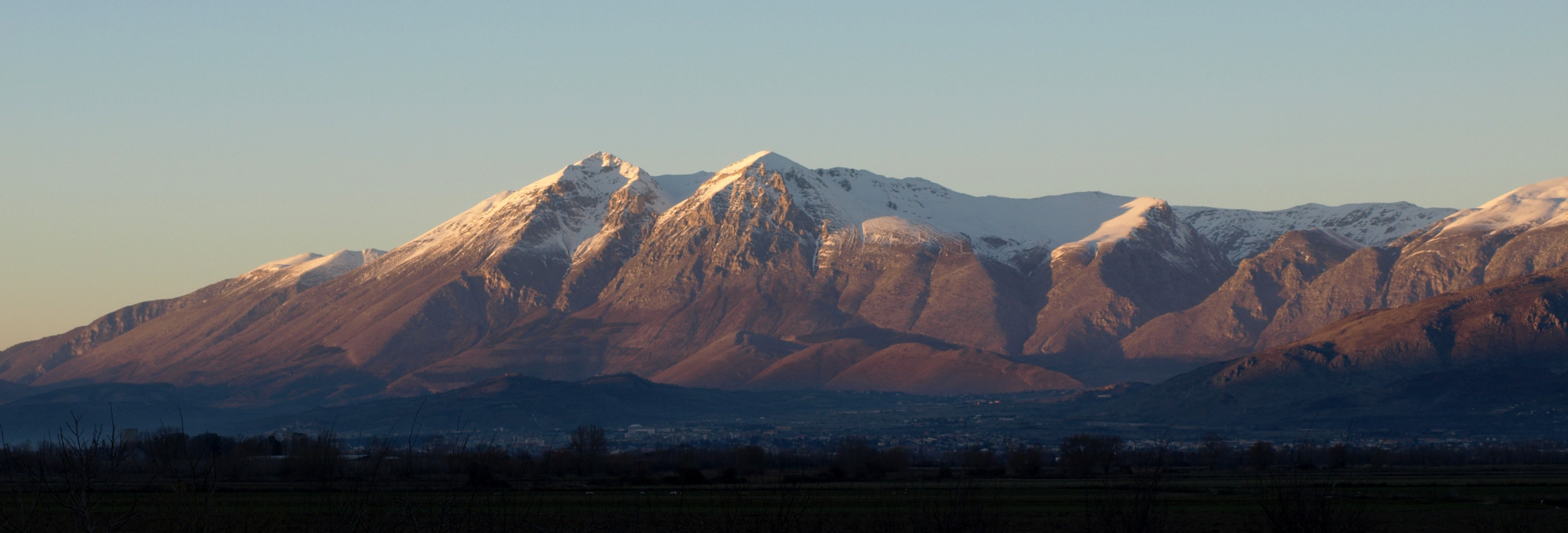 Il massiccio del Monte Velino al tramonto